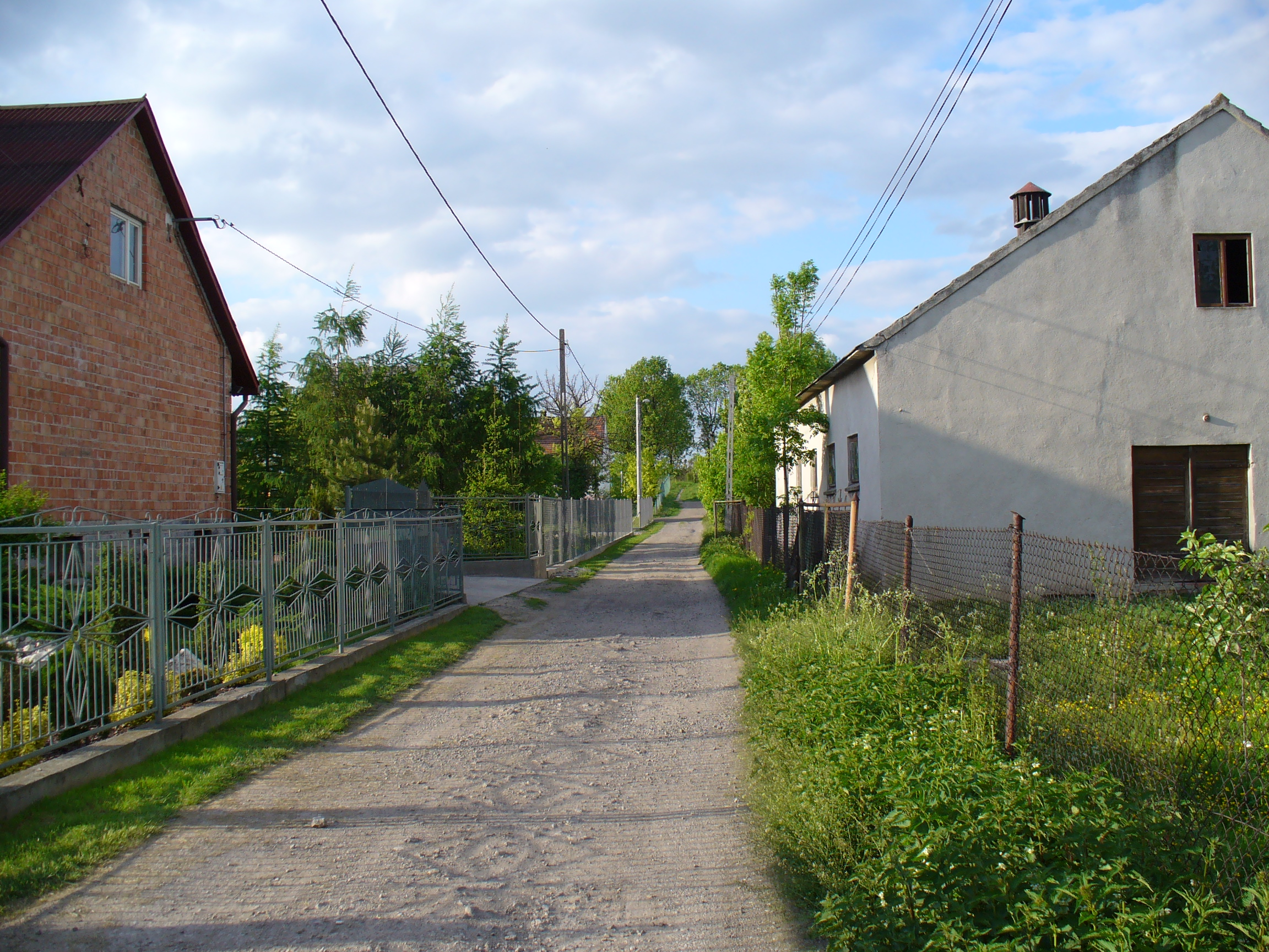 Polanowice (woj. małopolskie).